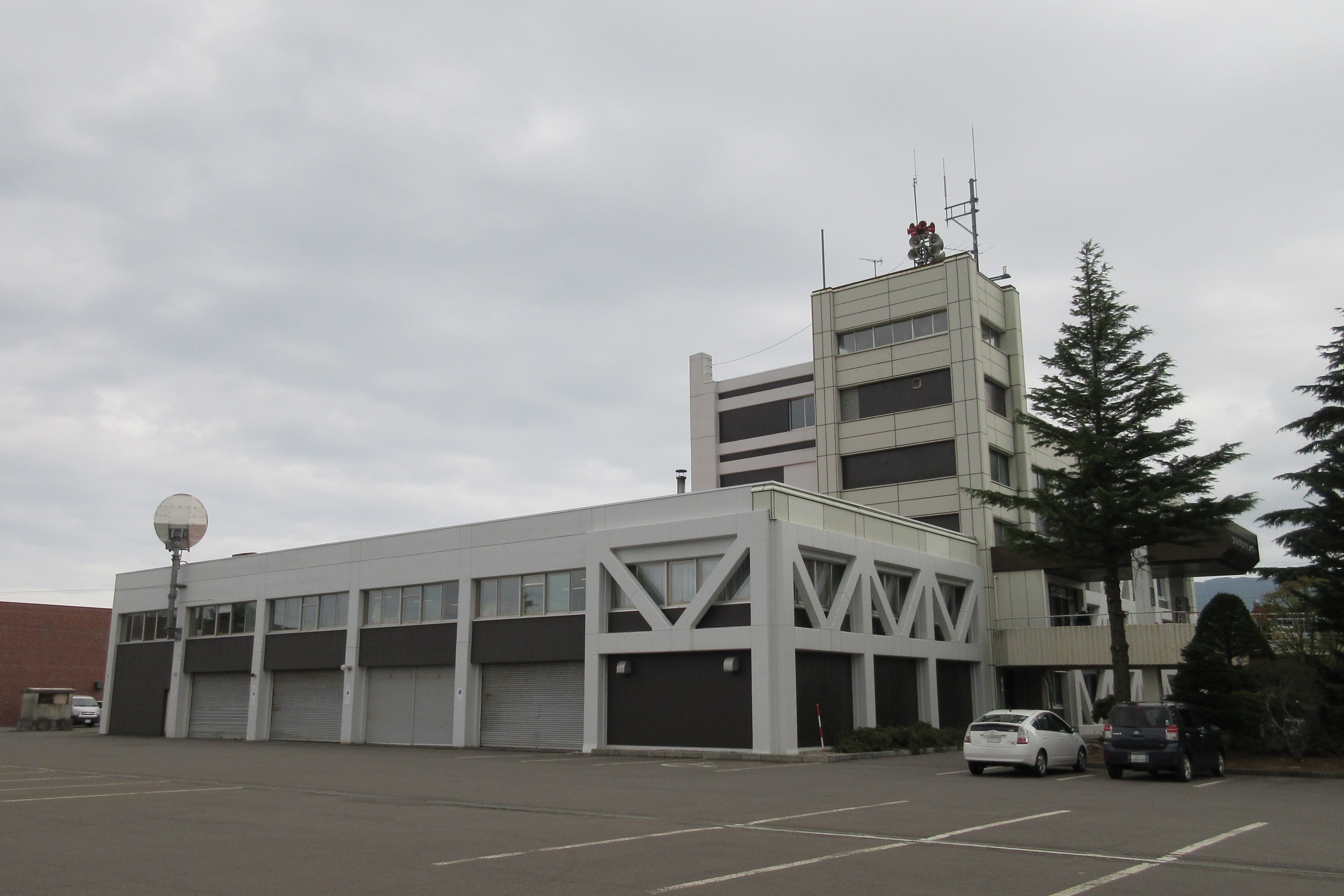 知内町役場